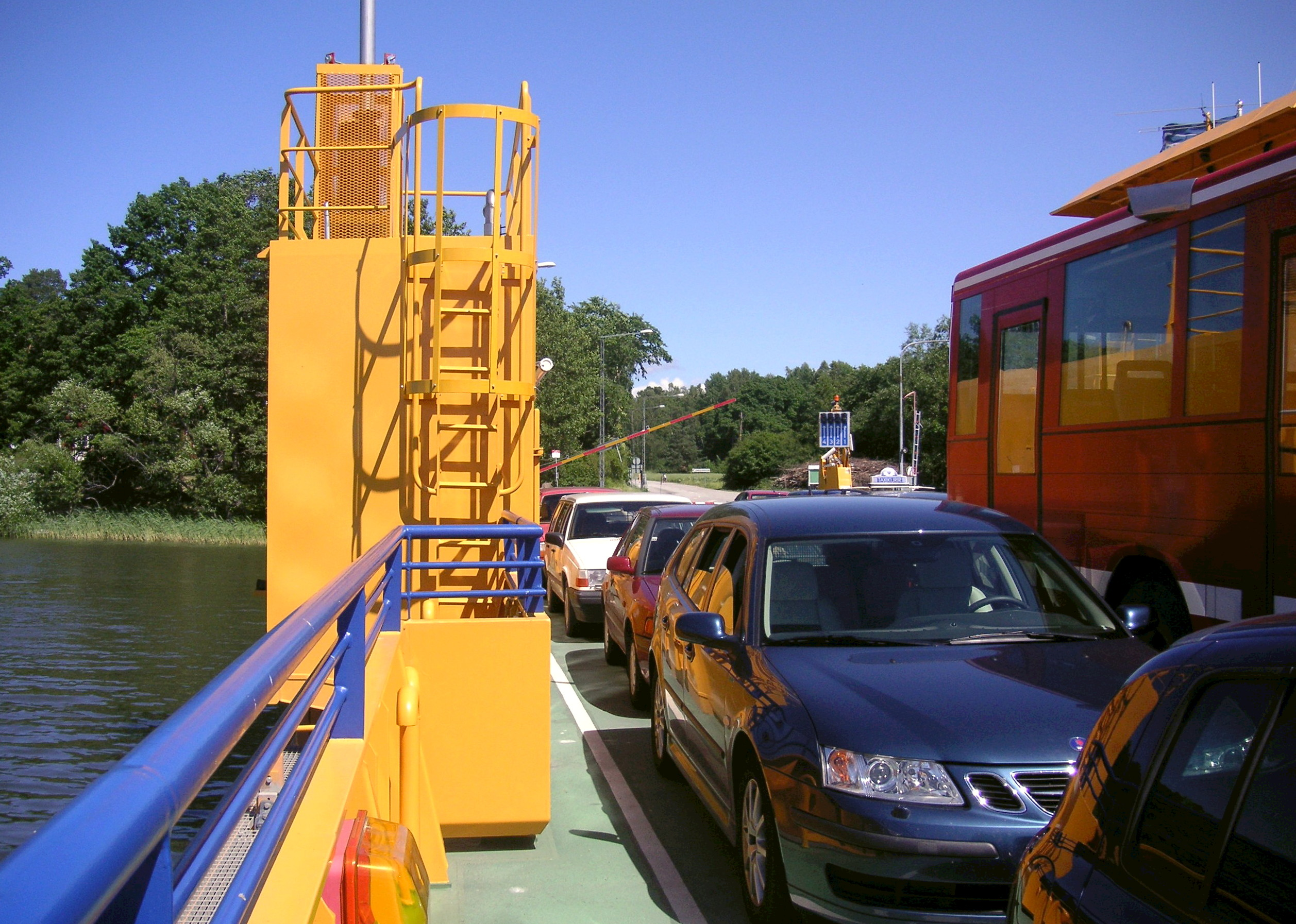 Adelsöns bilfärja. Personbilar och en buss ombord.